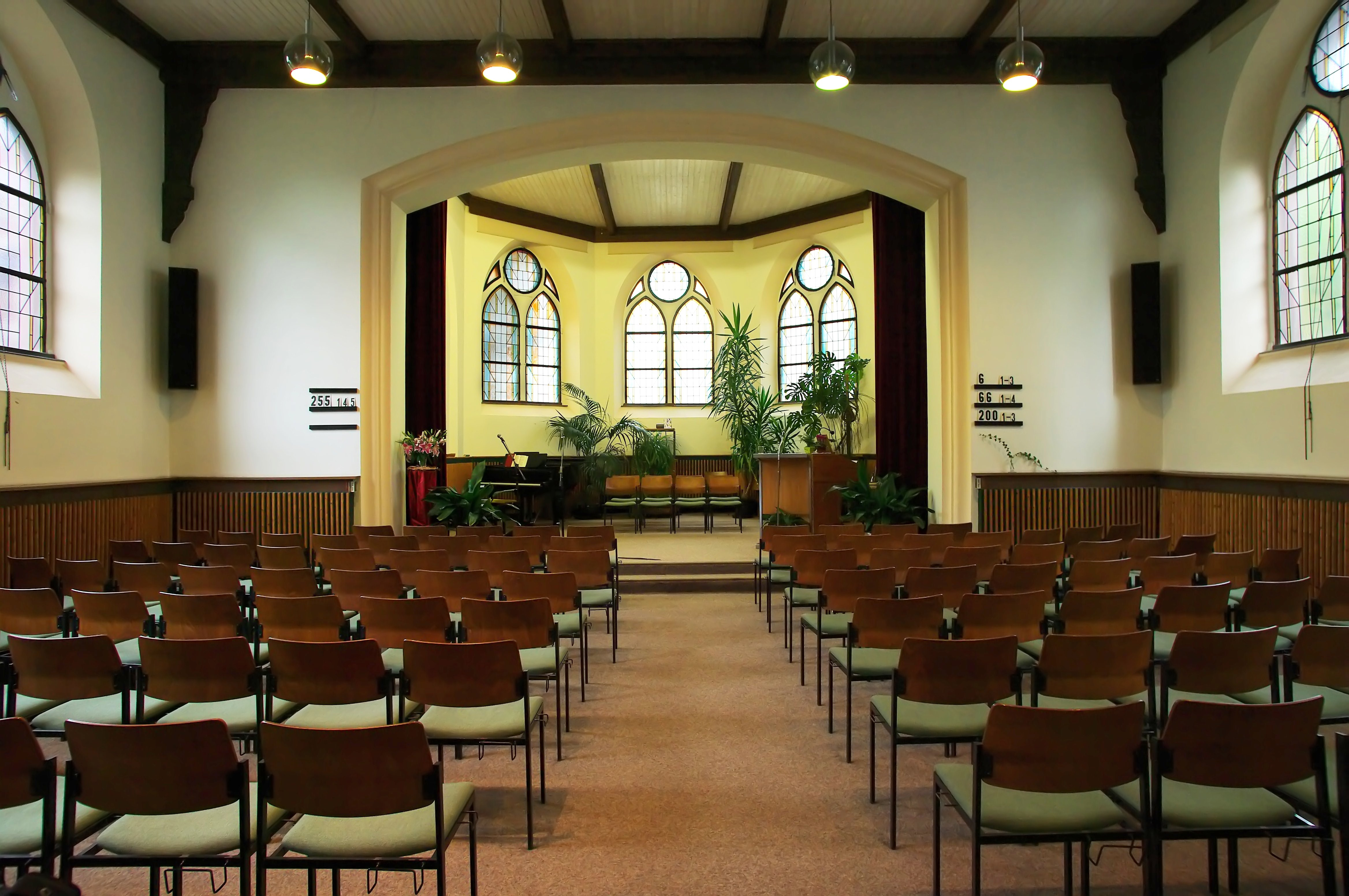 Kirche der Siebenten-Tags-Adventisten, Turnseestraße 59, 79102 Freiburg im Breisgau; Innenraum